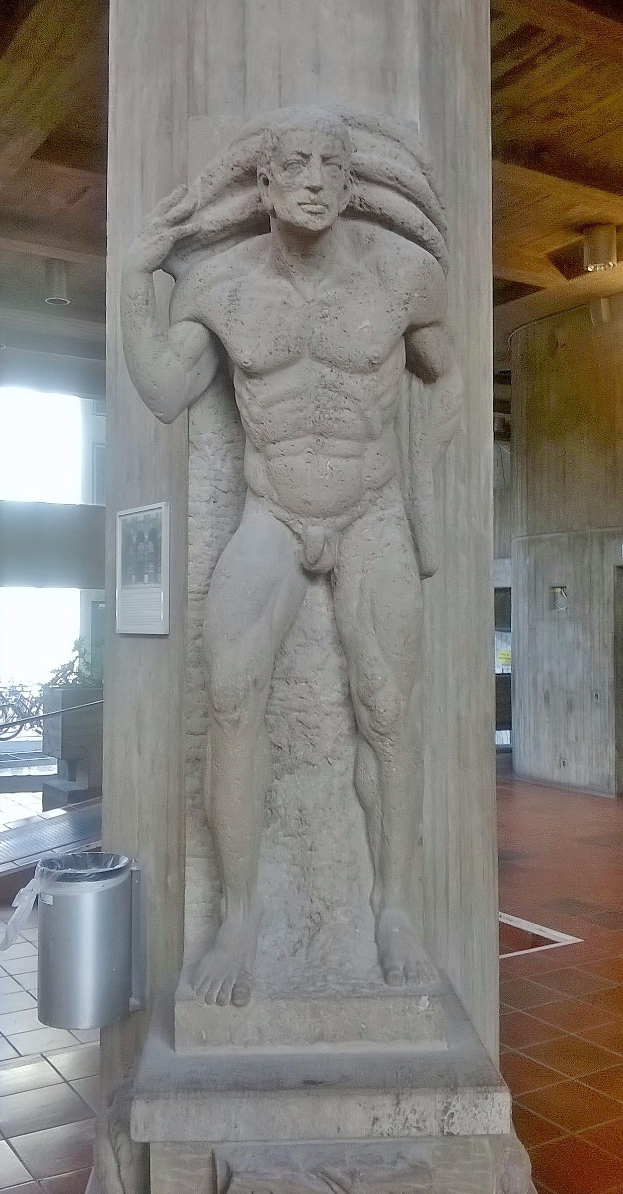 Skulptur vom ehemaligen Portal der Lederwarenfabrik J. Mayer. Standort im Rathaus Offenbach am Main